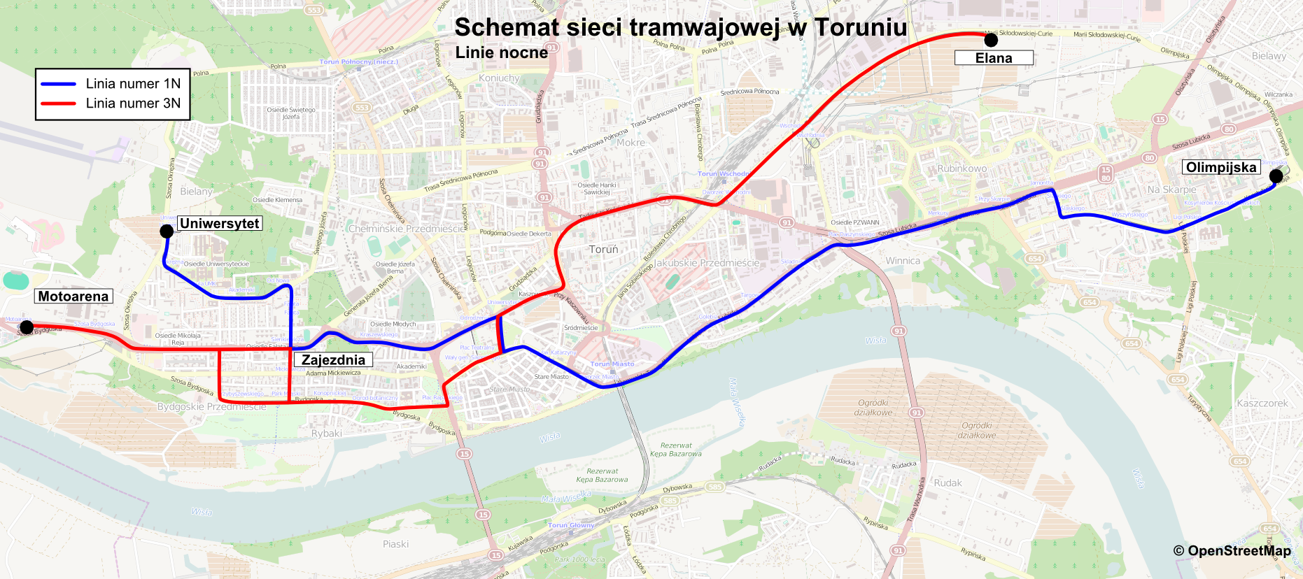 Siec tramwajowa Torun- linie nocne